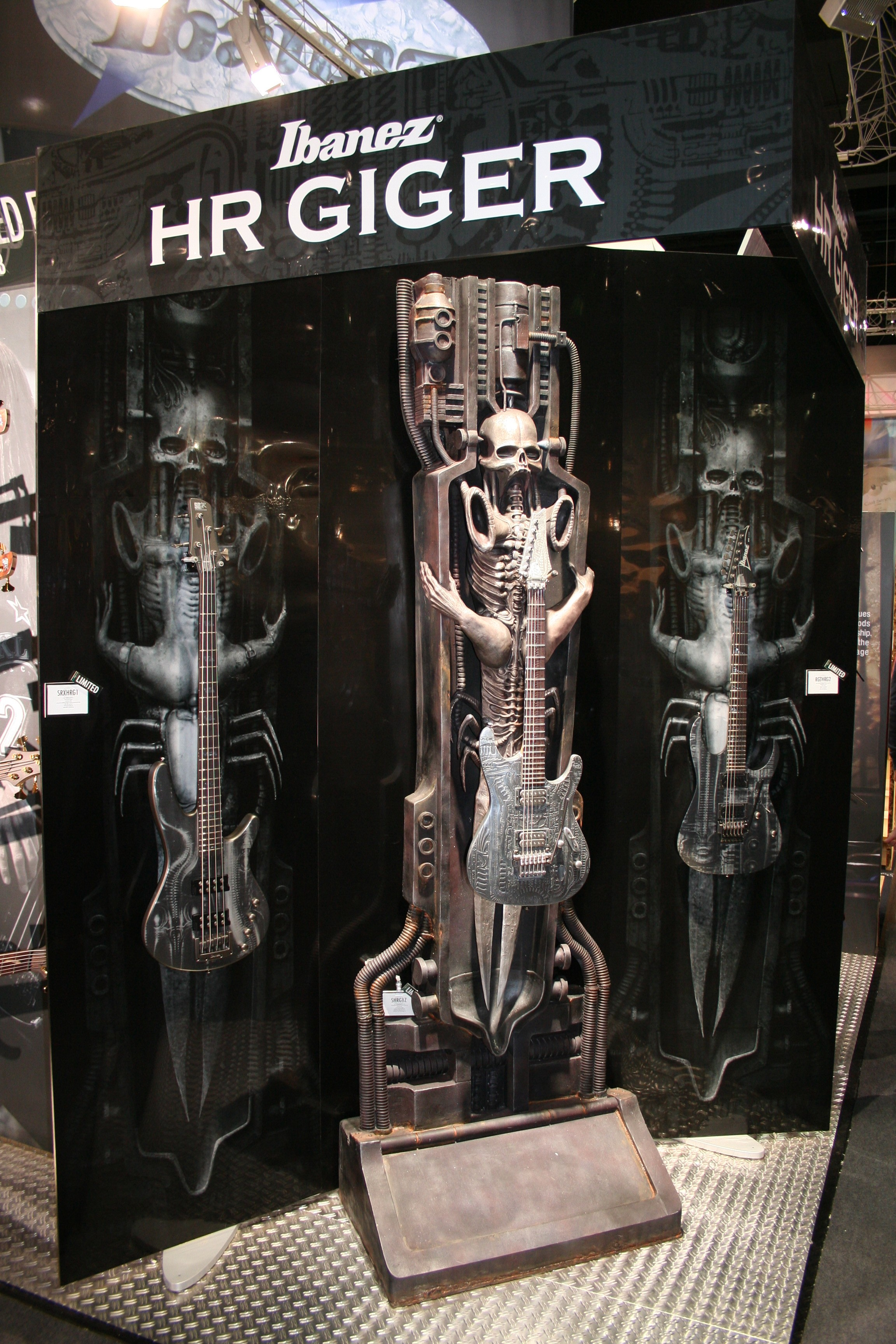 Ein E-Bass und zwei E-Gitarren entworfen von H.R. Giger am Ibanez-Stand auf der Frankfurter Musikmesse 2006